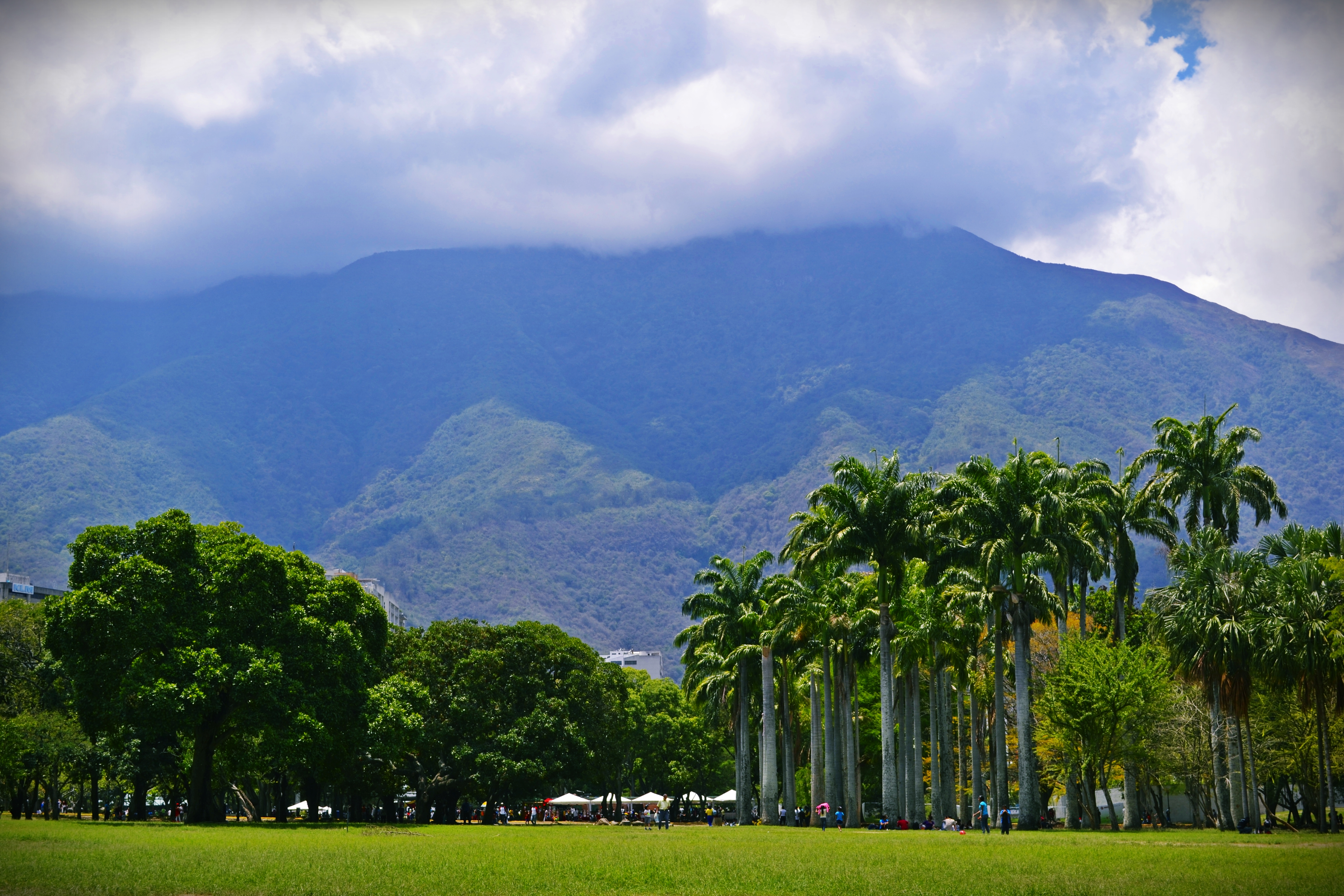 Avila desde el Parque del Este